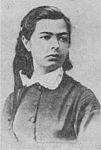 Любатович Ольга Спиридоновна - русская революционерка, член Исполнительного комитета партии "Народная воля"